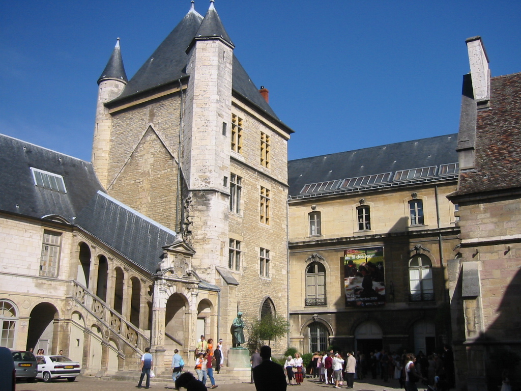 Cours du palais des ducs de Bourgogne 2